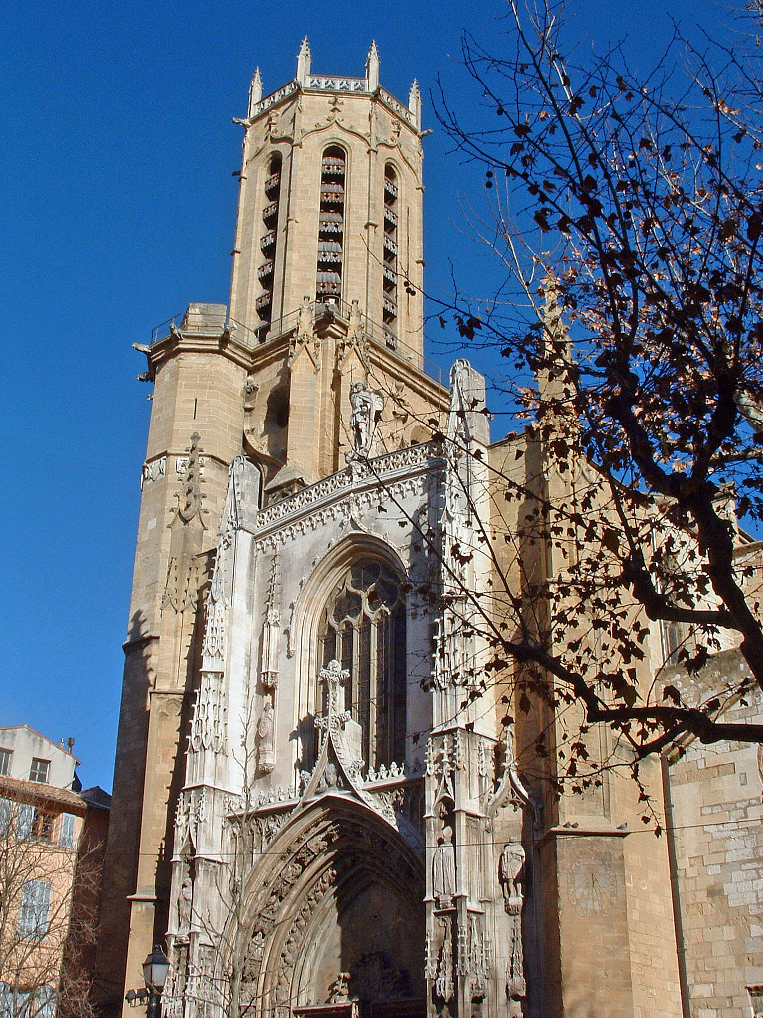 Aix-en-Provence - Façade ouest, clocher et vitrail du "Triomphe de la Foi" (atelier Didron, 1858) de la cathédrale Saint-Sauveur, Bouches-du-Rhône (France).